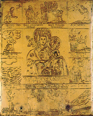 Беларуская (тарашкевіца): Менск (Miensk). Саборная царква Сьвятых Апосталаў Пятра і Паўла, абраз